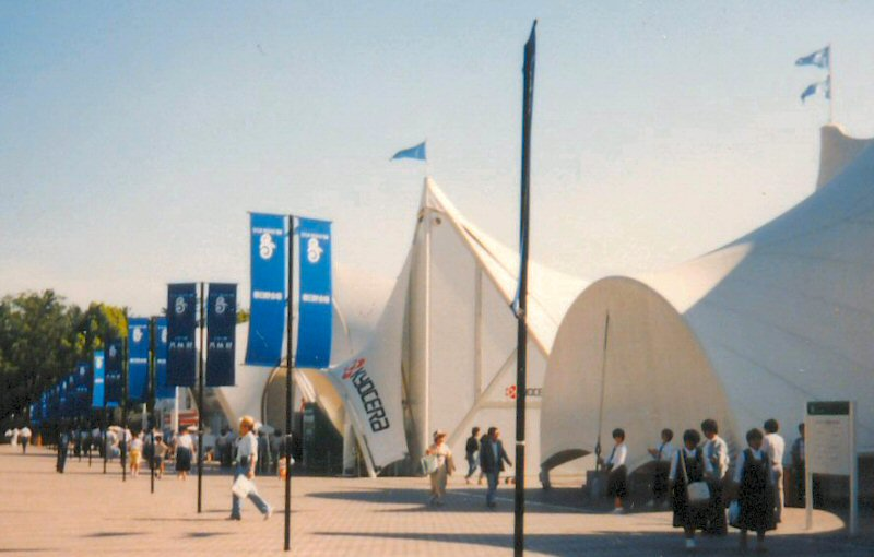 ならシルクロード博覧会会場内